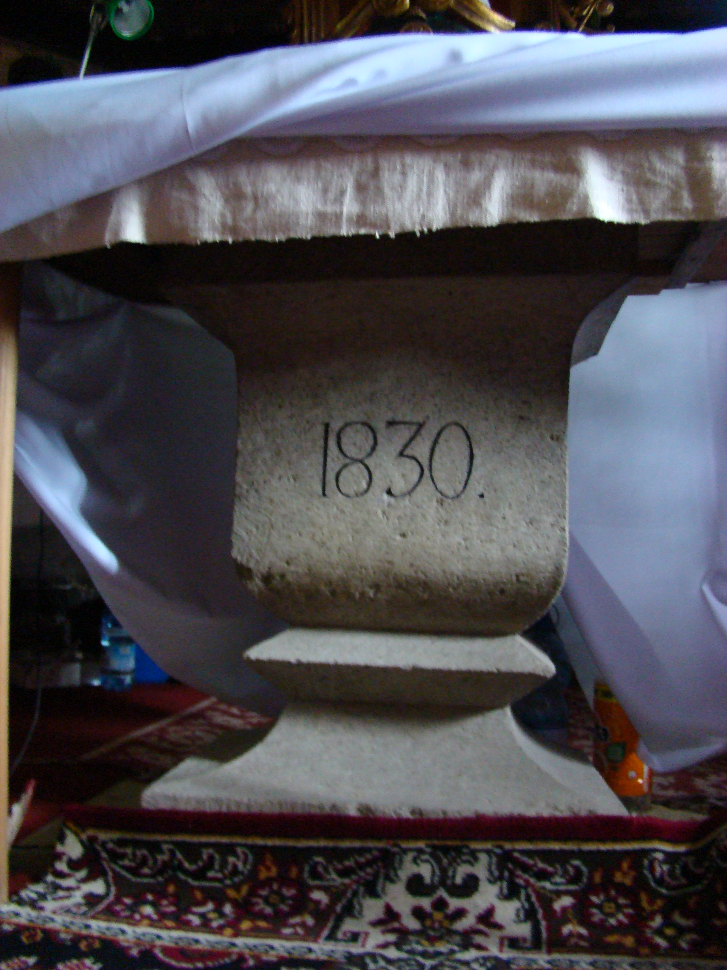 Biserica „Sf. Arhangheli Mihail și Gavriil” din Răstoci”, județul Sălaj